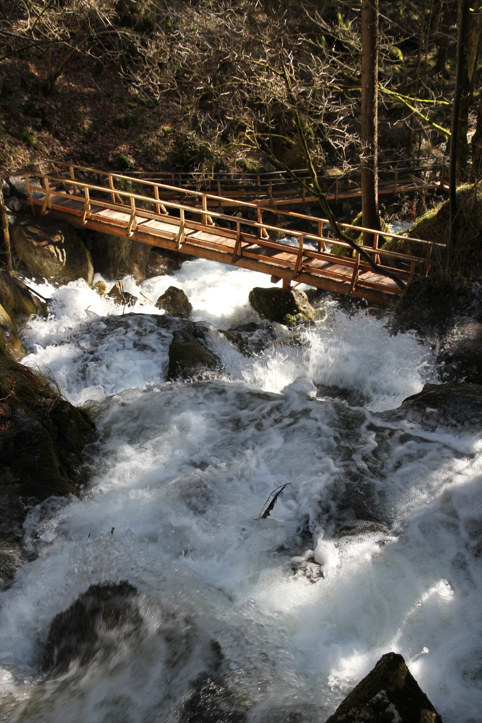 Die Myrafälle im Mittelbereich in der niederösterreichischen Gemeinde Muggendorf.